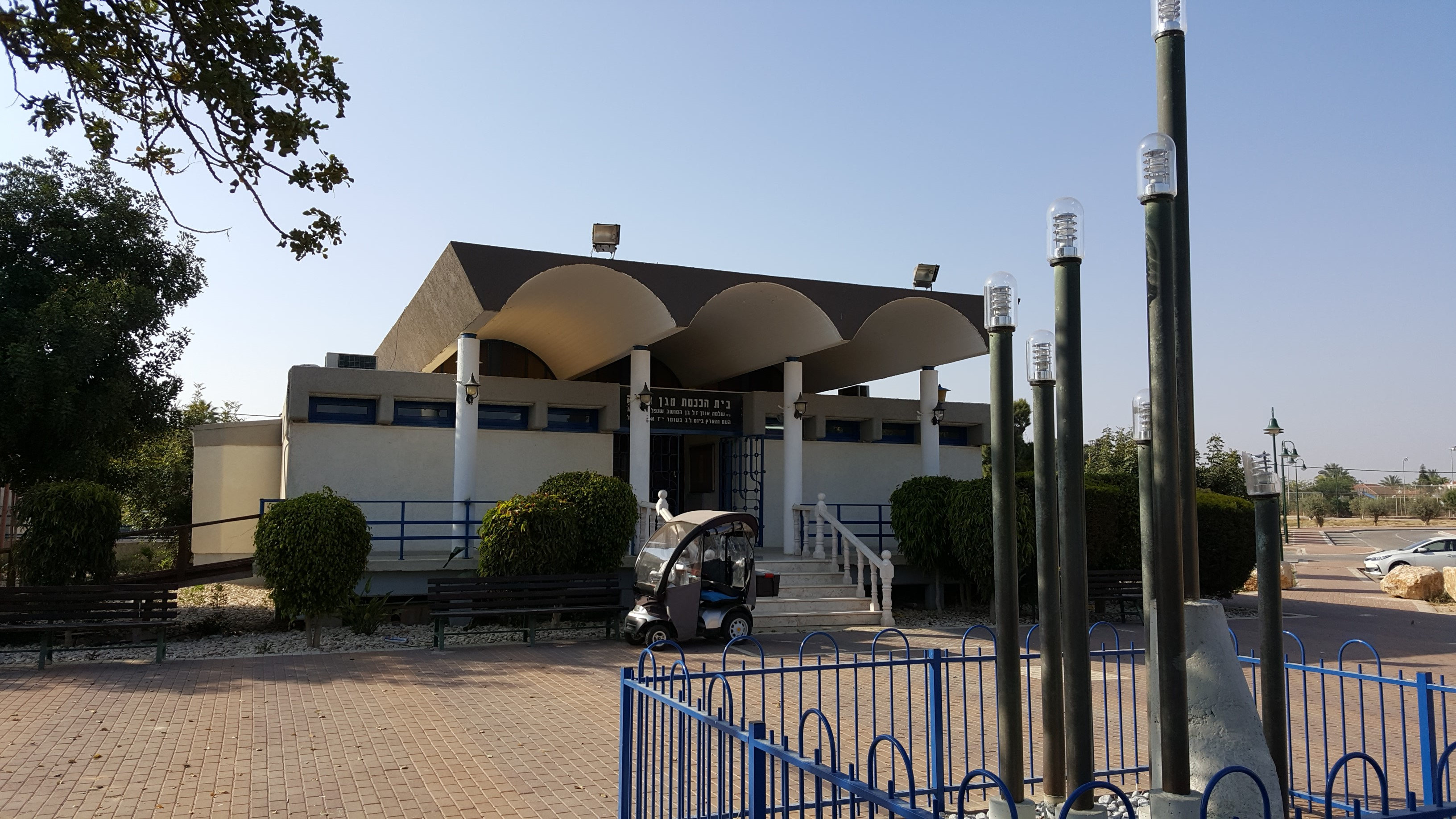 בית הכנסת "מגן שלמה" הוקם על שם שלמה אוזן שנפל במלחמת ההתשה בתעלת סואץ. בנו הבכור של אהרון אוזן שהיה שר החקלאות וחבר מושב גילת.